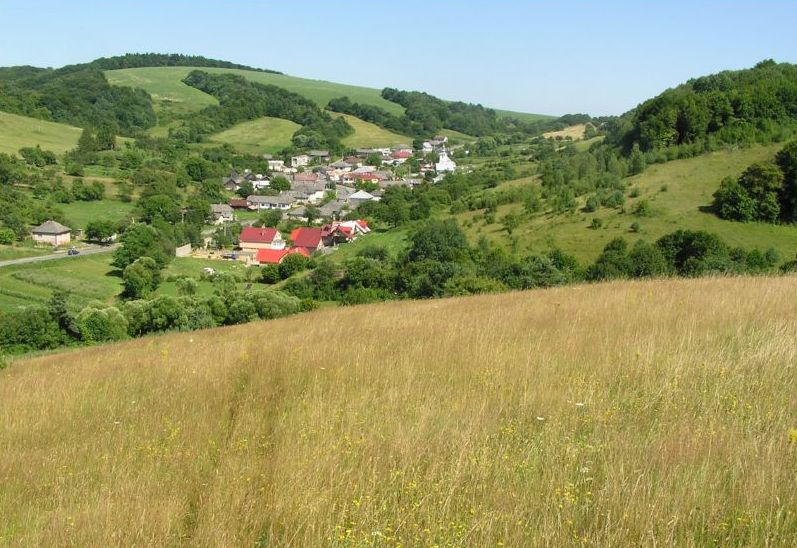 Fijas